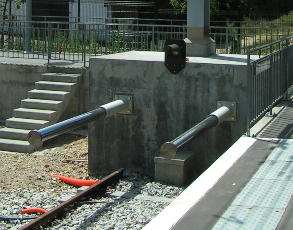 Buffer stop in Saint-Rémy-lès-Chevreuse.